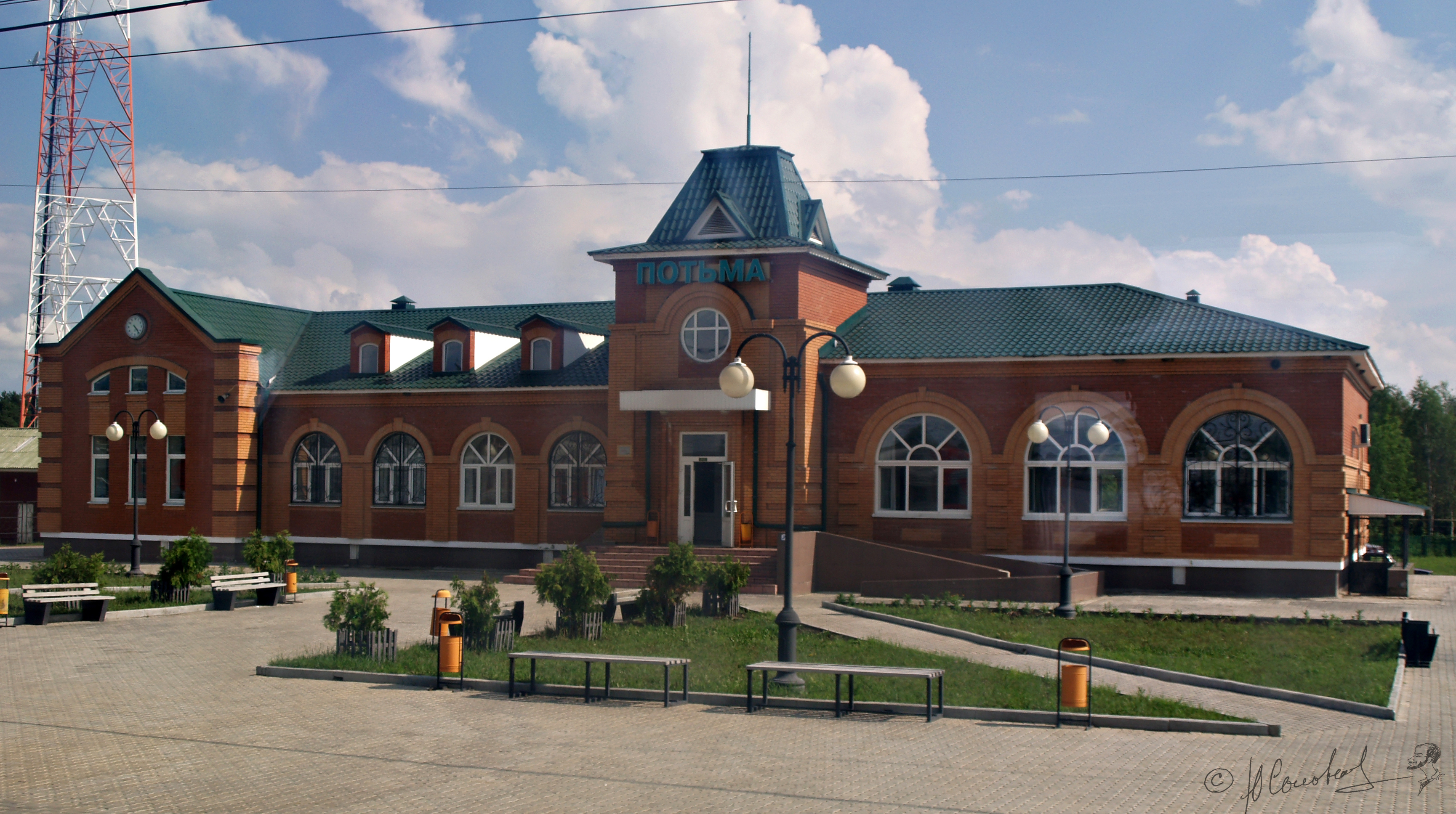 Здание вокзала